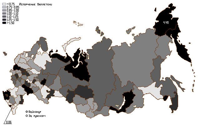 Испорченные бюллетени на парламентских выборах 2007 года (по регионам)